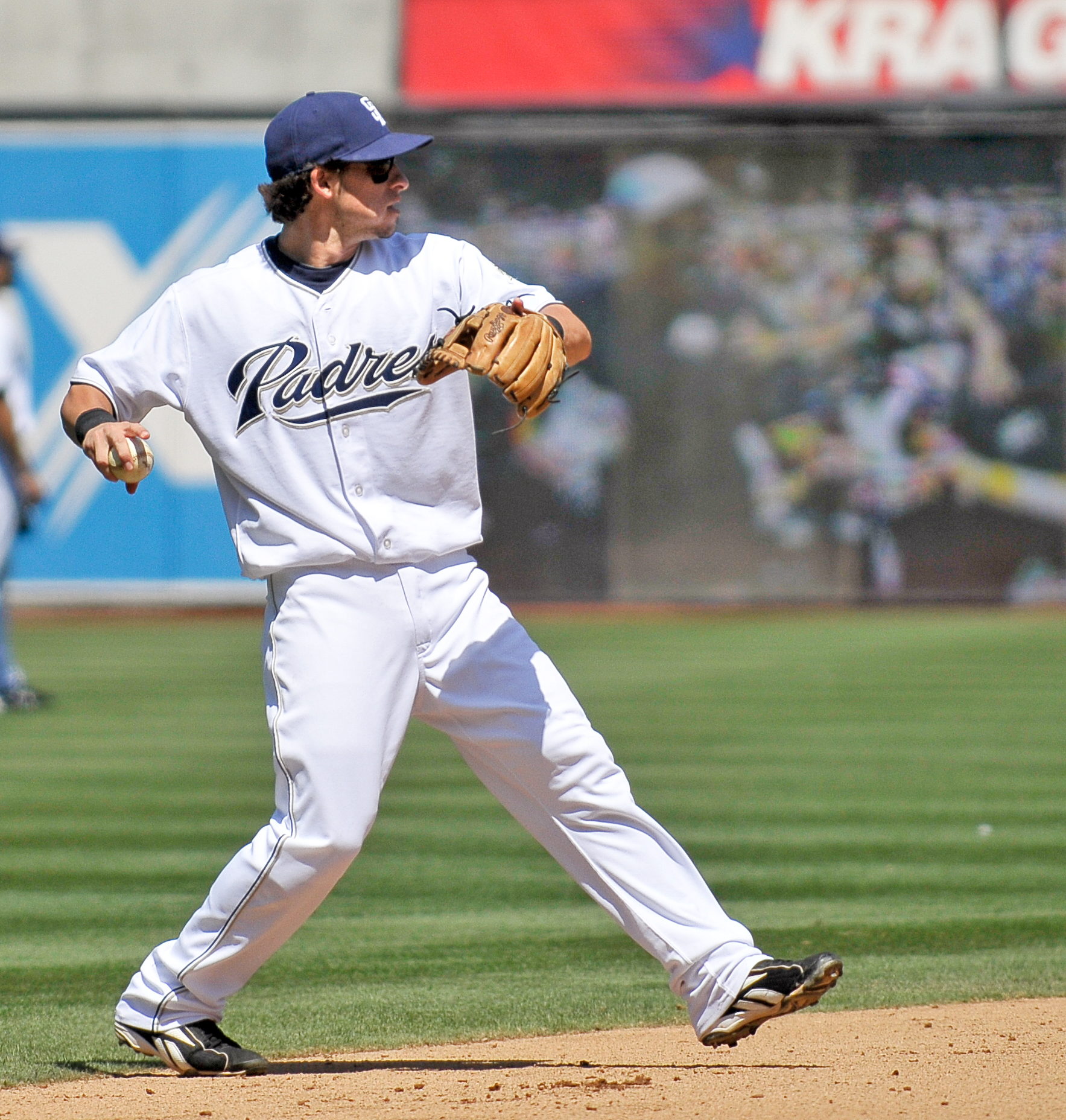 Sean Kazmar